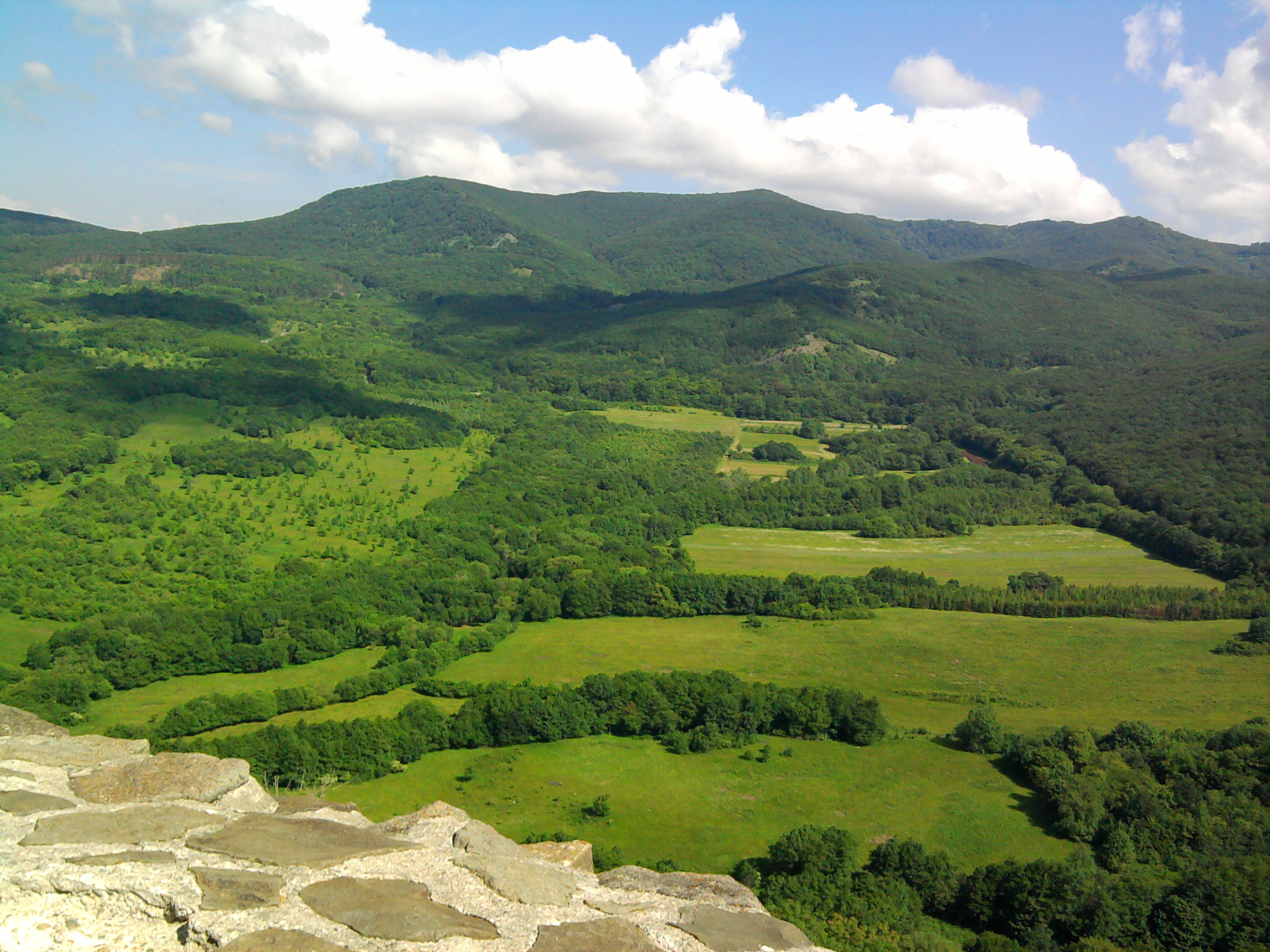 várrom This is a photo of a monument in Hungary, Identifier: 2767